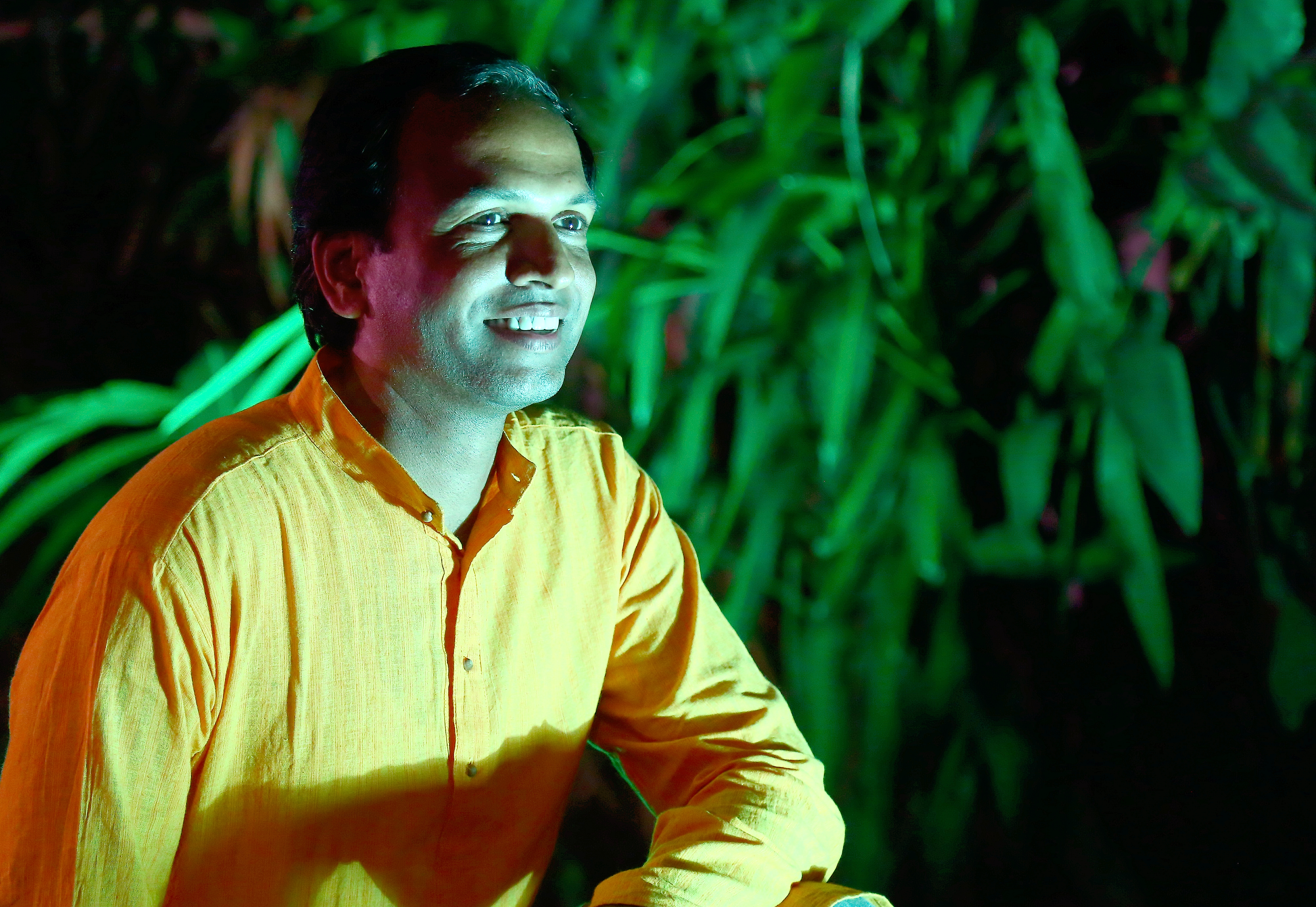 संदर्भ फोटो